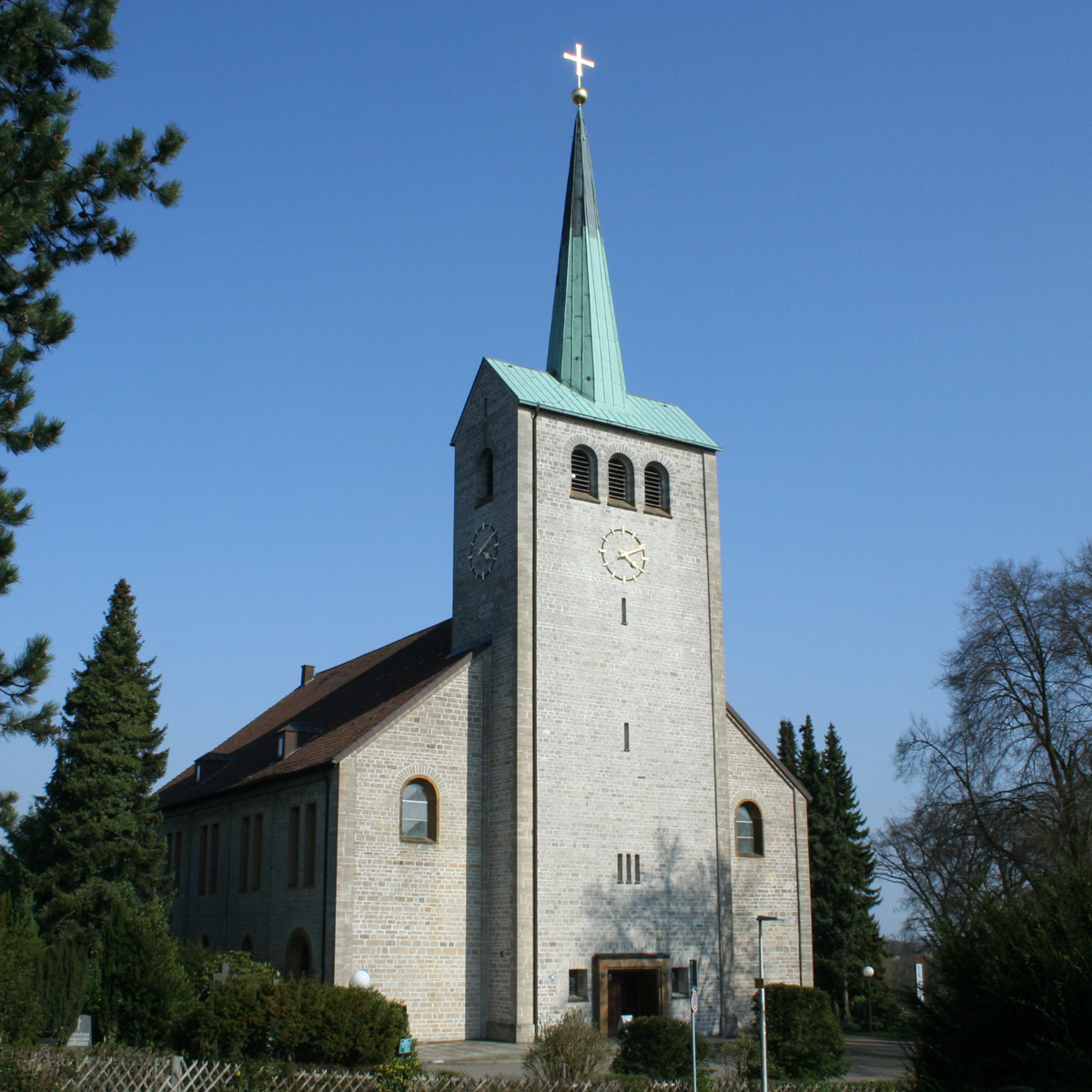 Evangelische Marienkirche Jöllenbeck (2014)